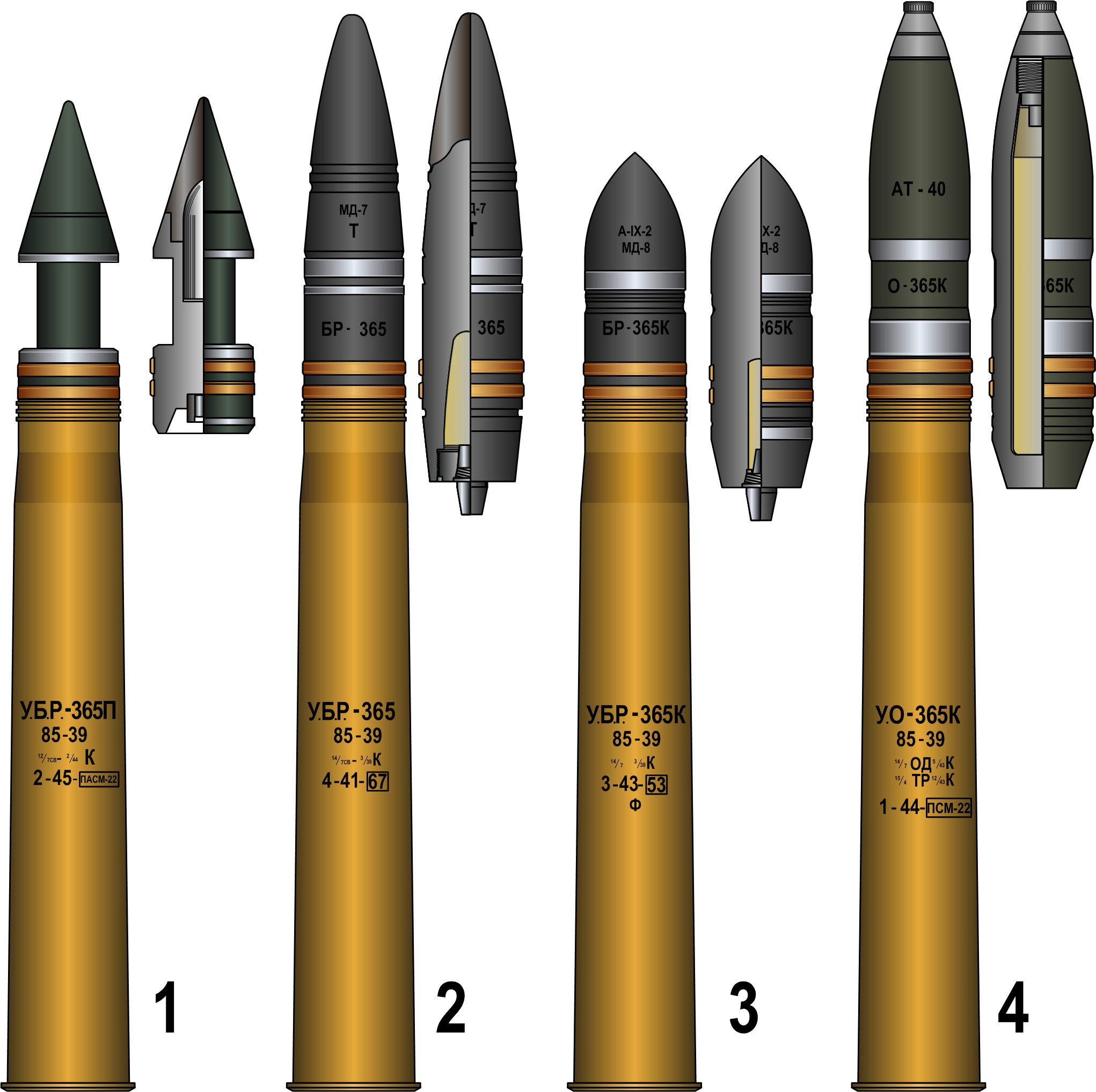 Выстрелы и снаряды 85мм пушки боковые виды выстрелов и снарядов